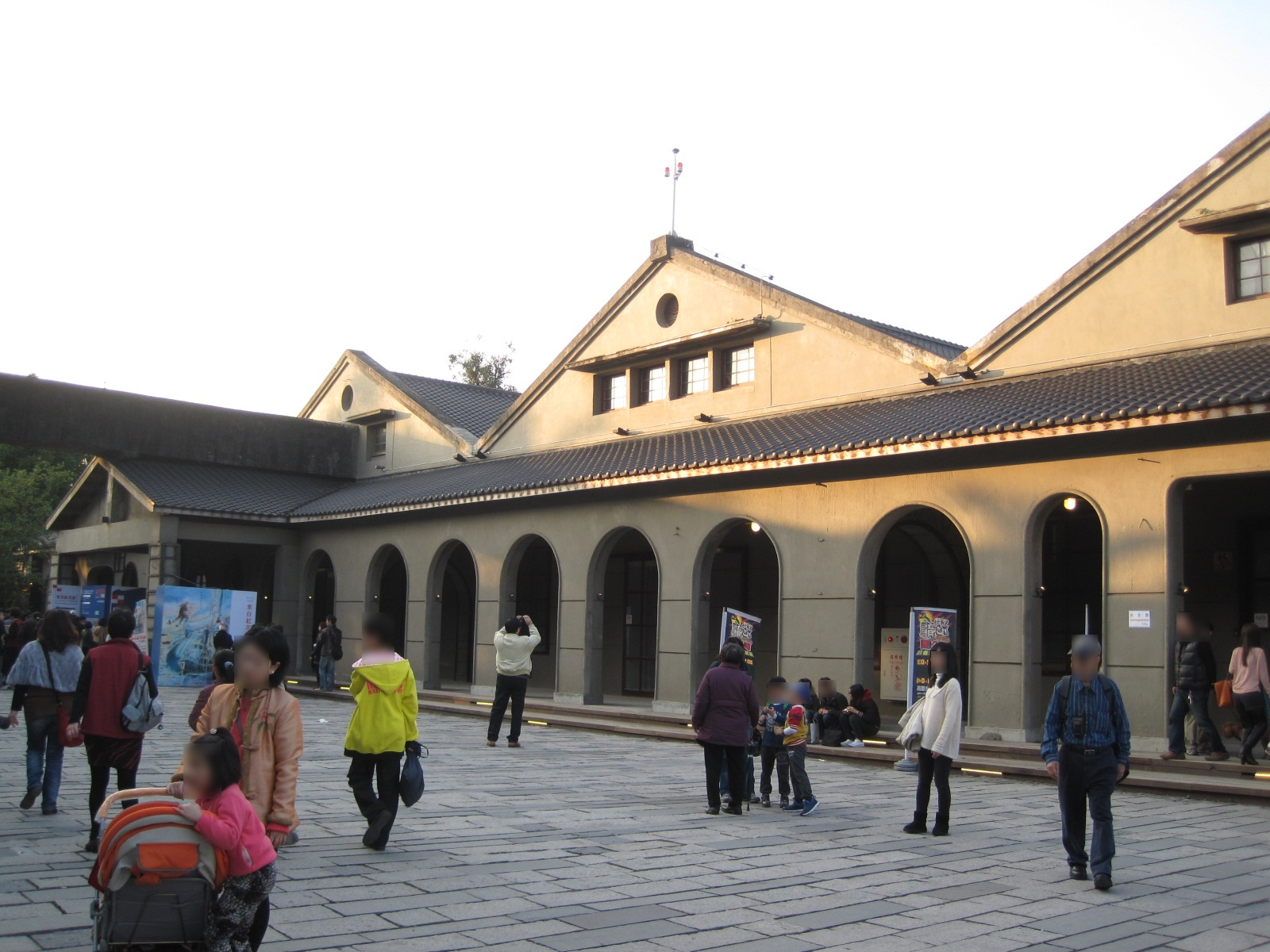 中文（台灣）: 松山文化創意園區二號倉庫、三號倉庫。